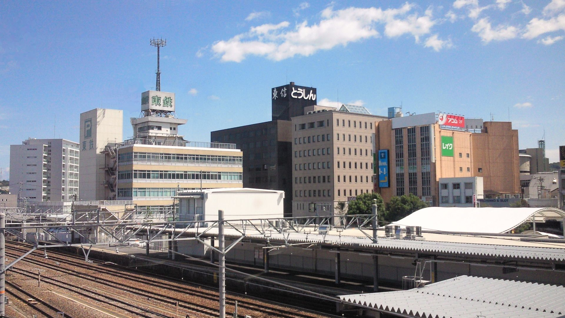 多治見駅南口周辺風景